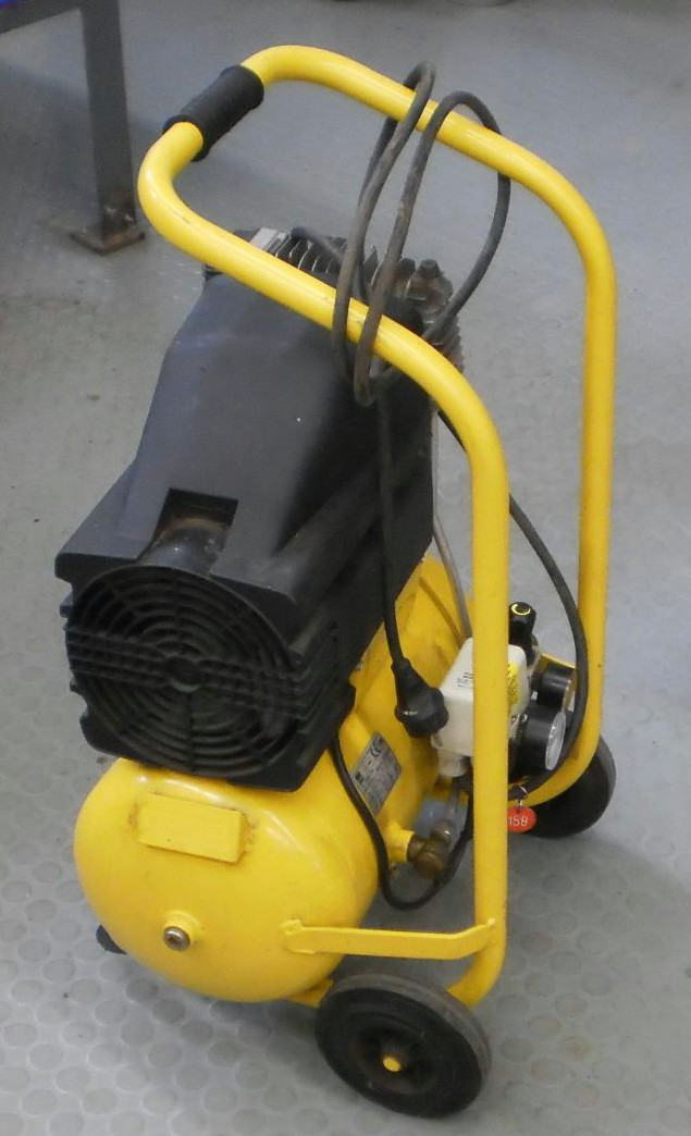 Fahrbarer Drucklufterzeuger mit Speicherbehälter